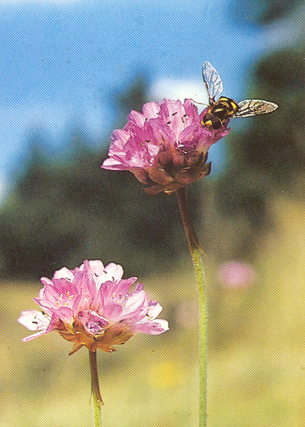 Galmei-Grasnelke_(armeria_maritima_ssp._calaminaria)